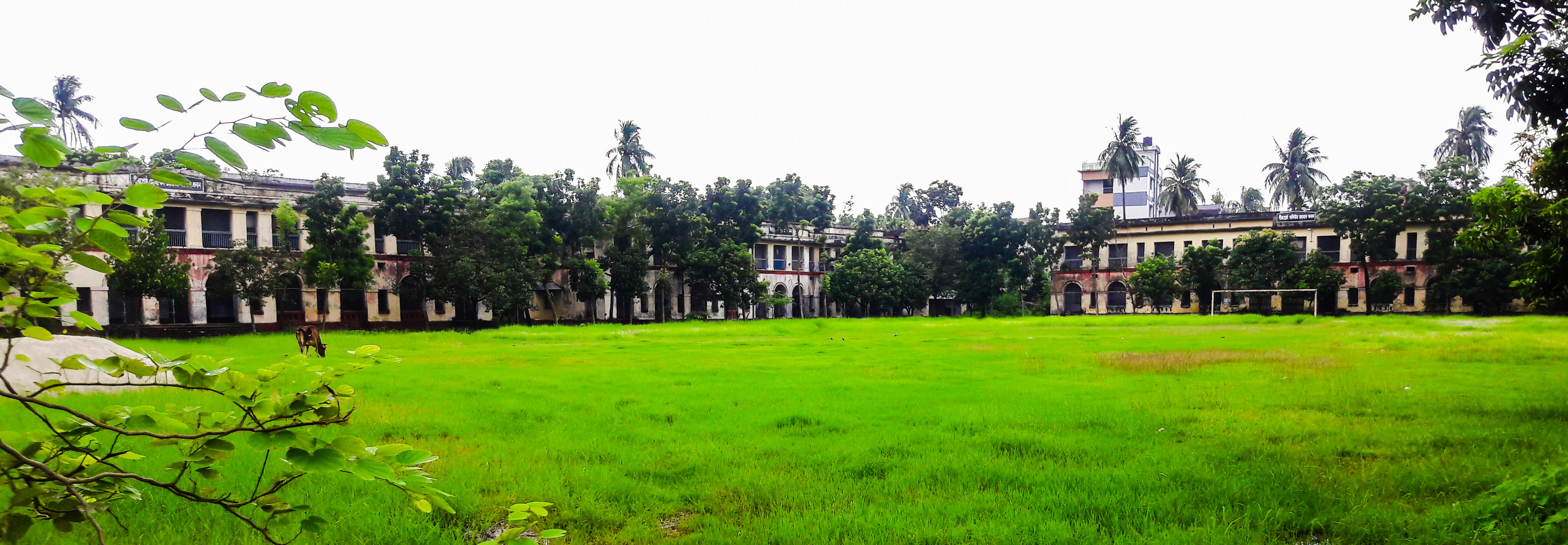 Rajshahi College Muslim Hostel